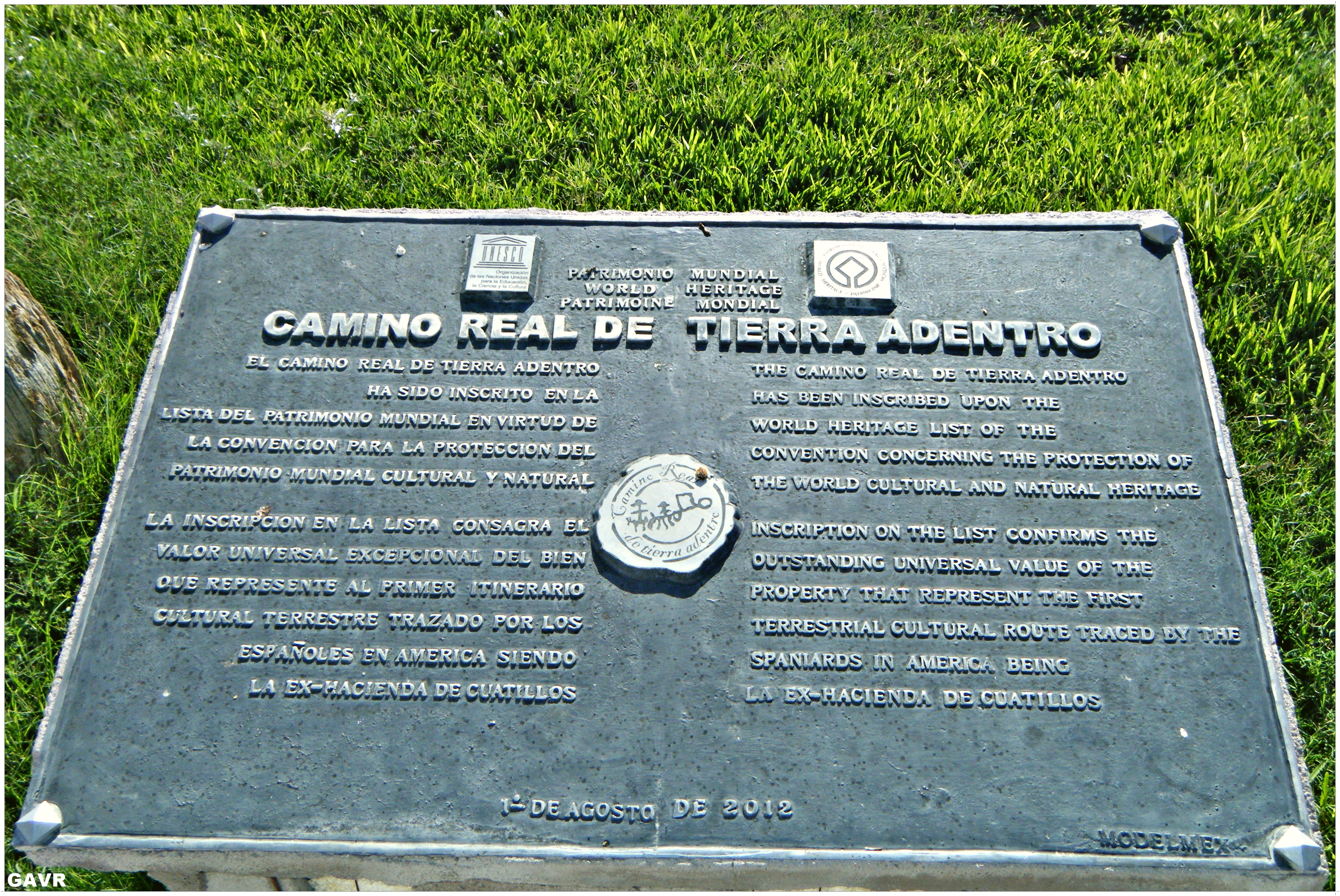 loscuatillosdgo